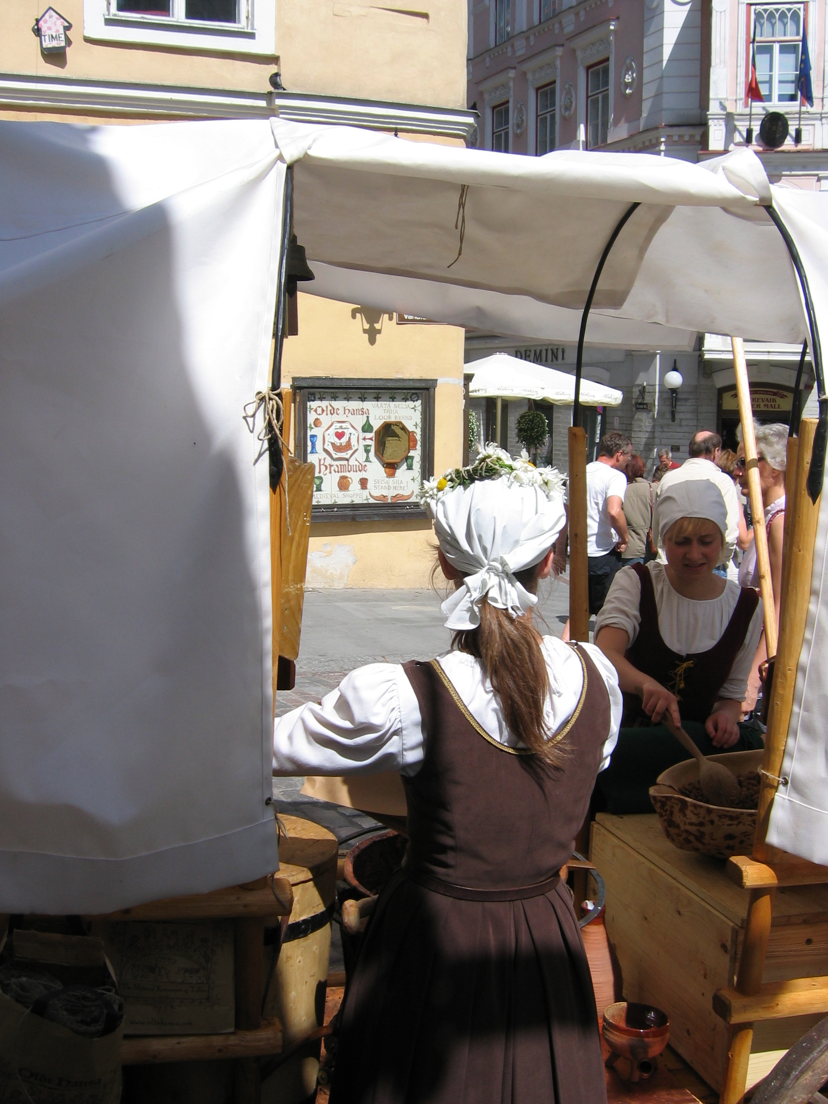 Tallinn, Stadtzentrum